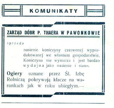 reklama ogłoszenie Dobra G.Thaer w Pawonkowie